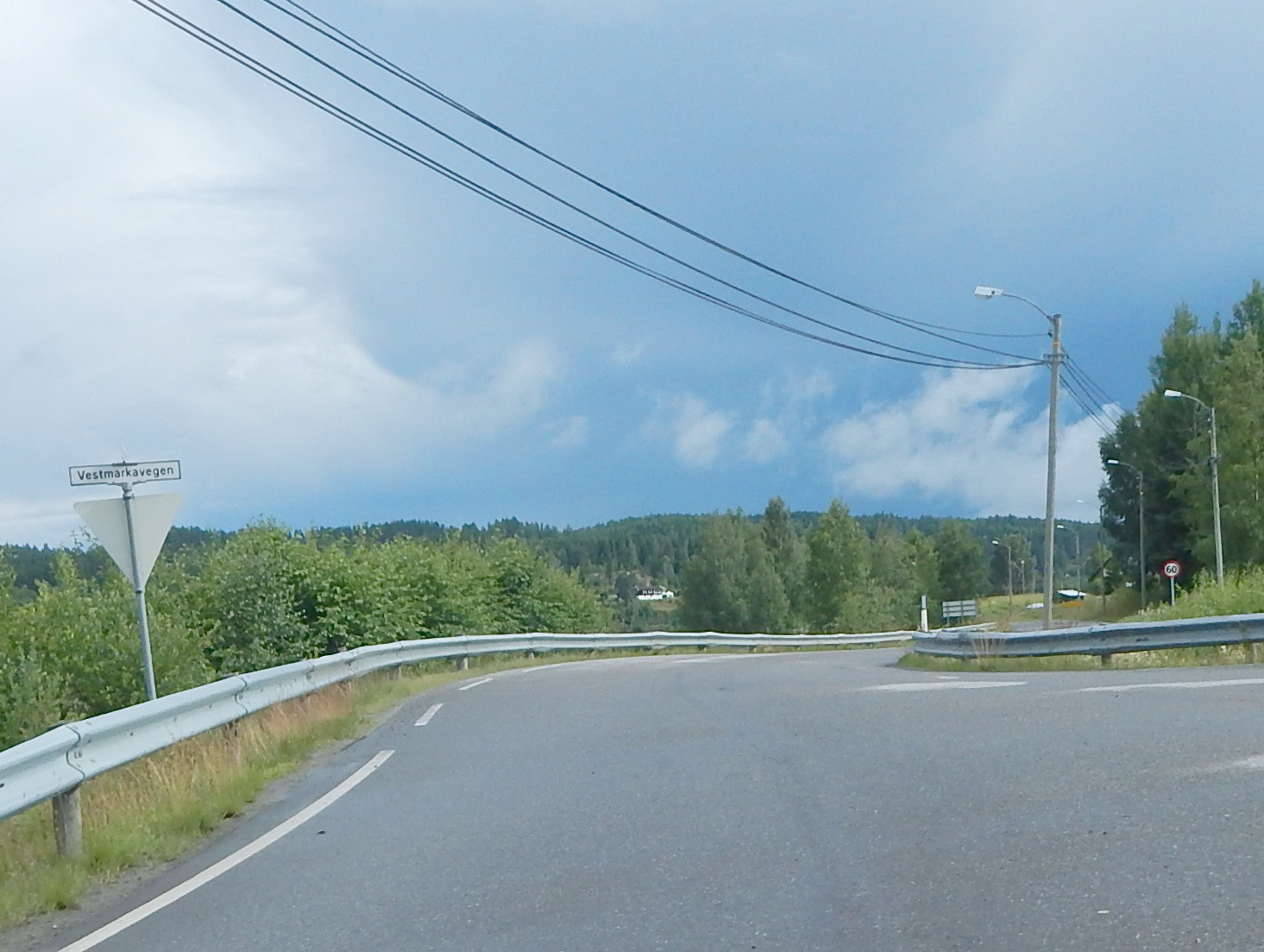 Skillingmarkvegen (fylkesvei 1990, tidl. 344) der den tar av fra fylkesvei 21